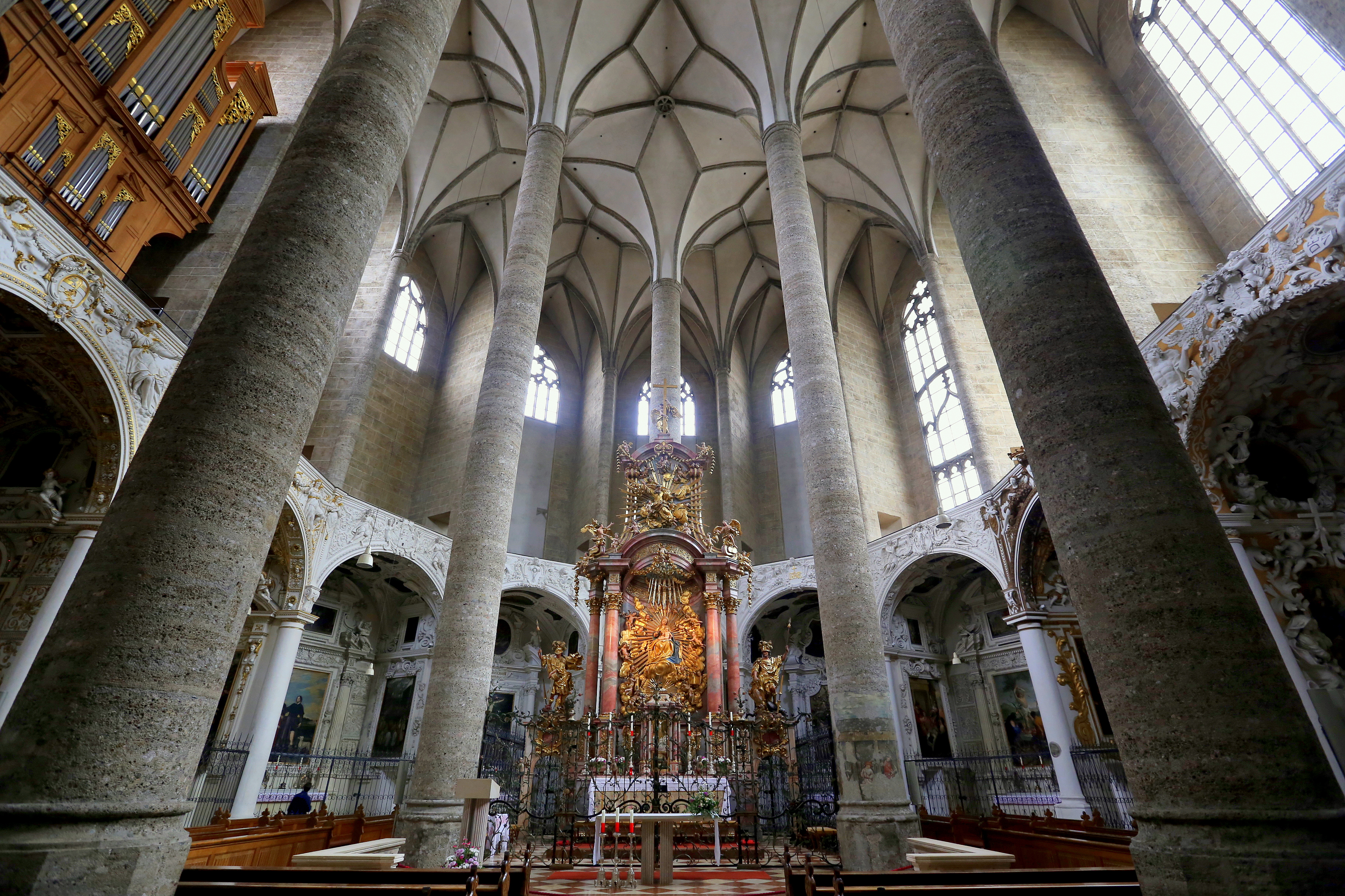 Ferences templom, Salzburg